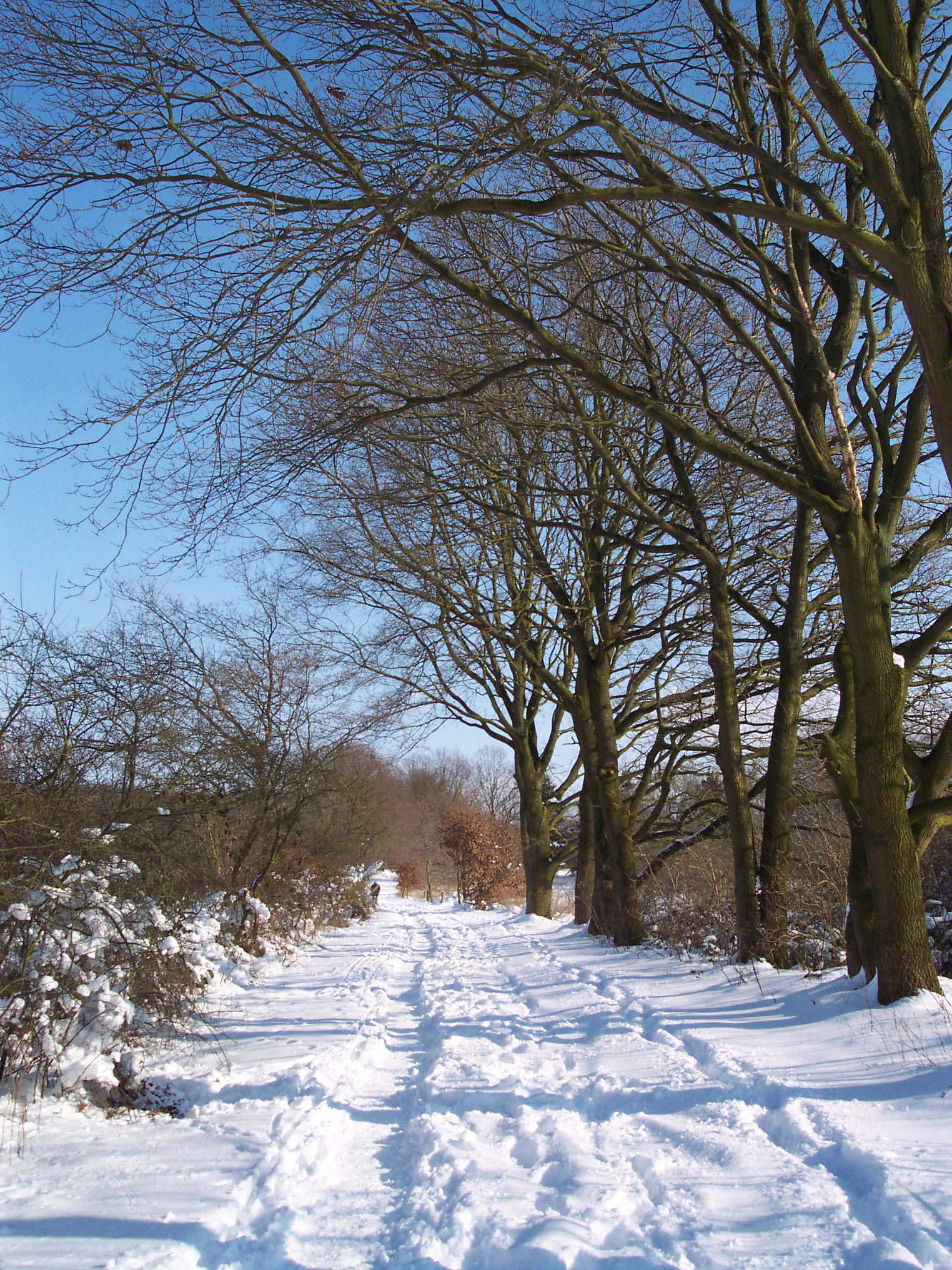 Bliedersdorf, Weg zur Bliedersdorfer Aue